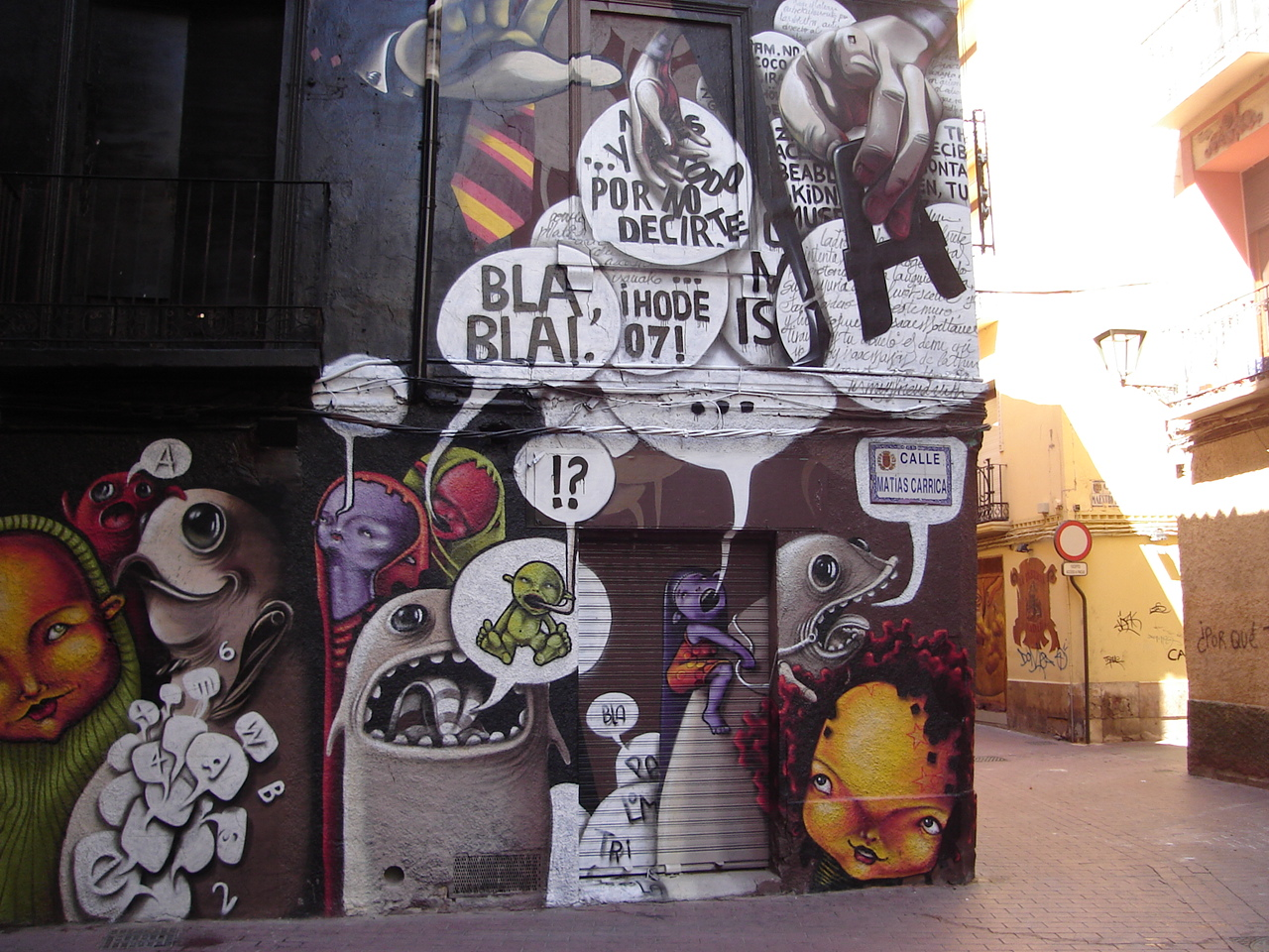 A house covered with graffiti in Matías Carrica str. in Zaragoza, Aragón, Spain (Una casa cubierta de graffiti en la calle Matías Carrica de Zaragoza, España)